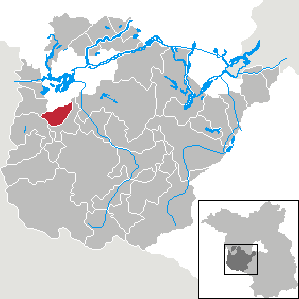 Wenzlow in Brandenburg (Country) - District Potsdam-Mittelmark